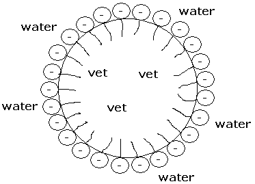 Schematische weergave van een micel van olie in water. Deze afbeelding is door mij zelf getekend met het programma MS Paint.